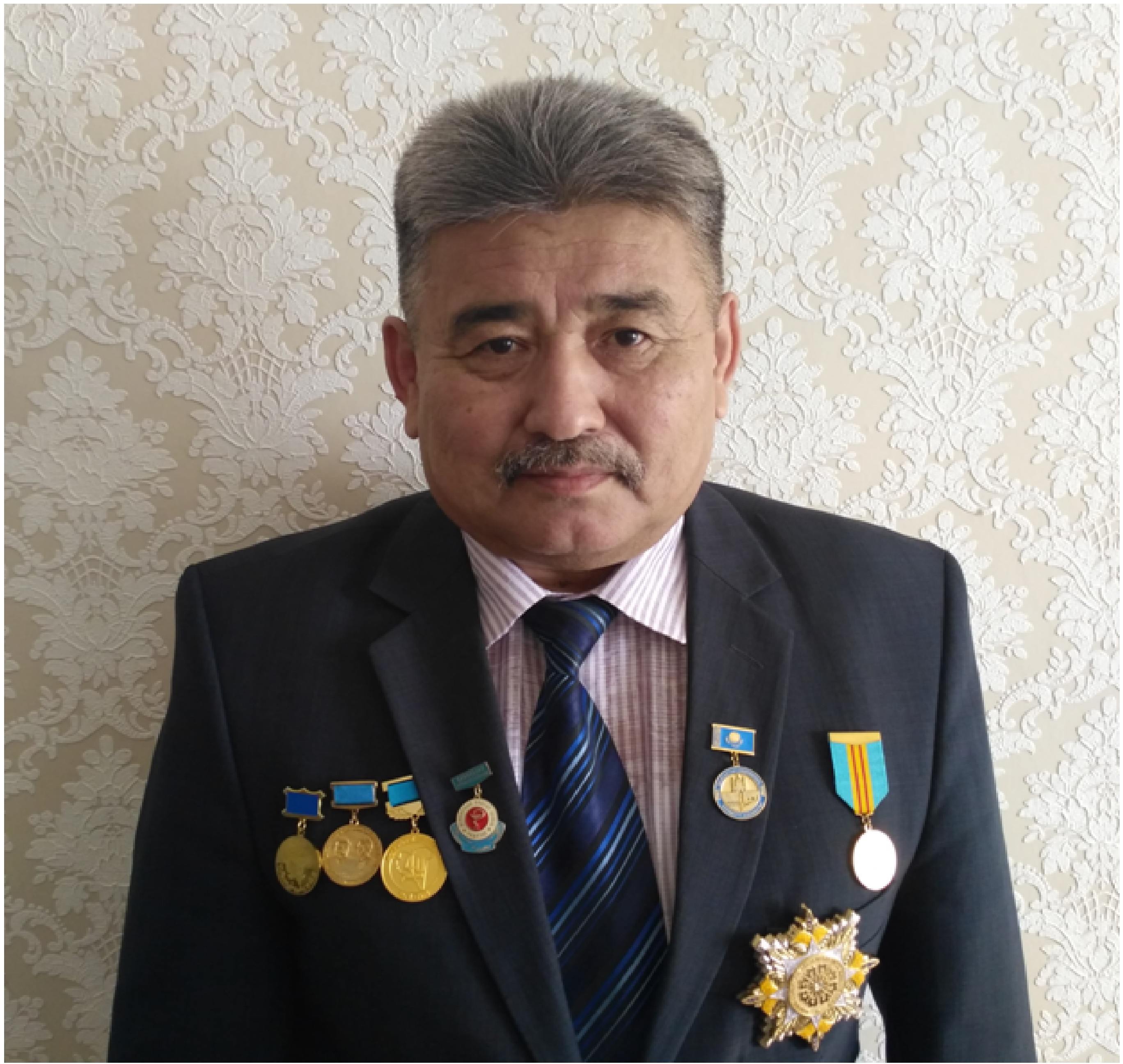 Қазақша (кирил): Байназаров Б.